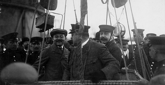 Der Ballon „Württemberg“ vor dem Aufstieg am Heilbronner Gaswerk - in der Mitte im Korb Peter Bruckmann, rechts Ernst Jäckh am 14. März 1909. Bruckmann und Jäckh flogen als Passagiere vom Gaswerk Heilbronn in die Nähe von Ansbach.